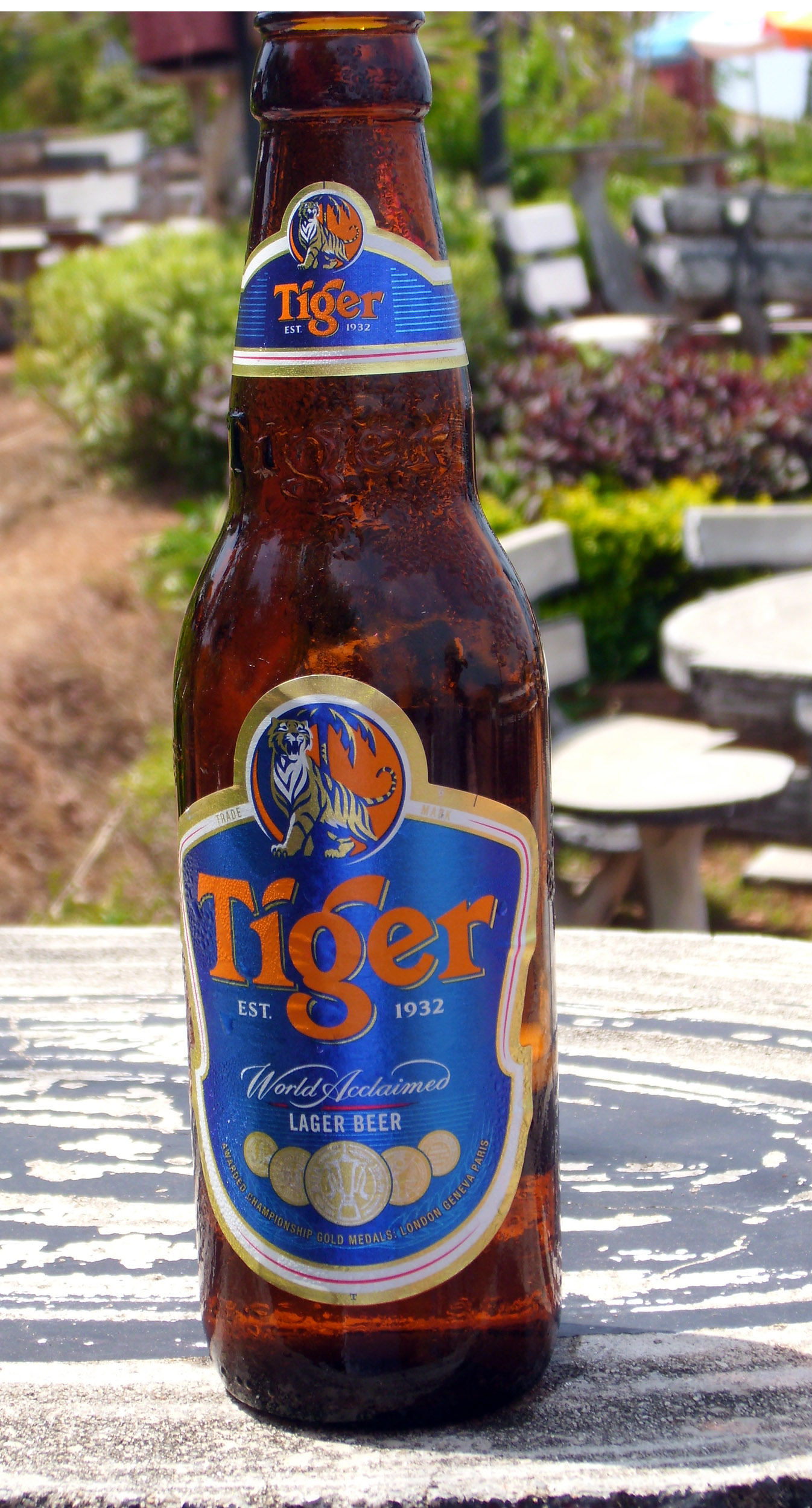 Flasche Tiger Bier